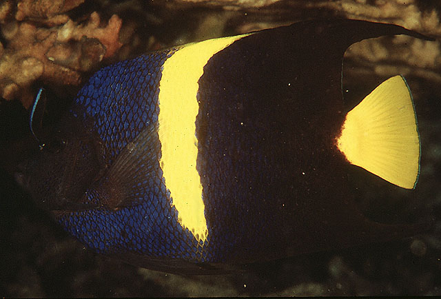 Pomacanthus asfur localizado en Florida, EE.UU. Se han localizado varios ejemlares en diferentes partes de Florida, probablemente provinientes de acuarios